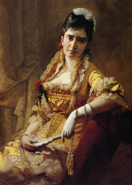 Виктор_Бобров._Портрет_певицы_Е.А.Лавровской_1881